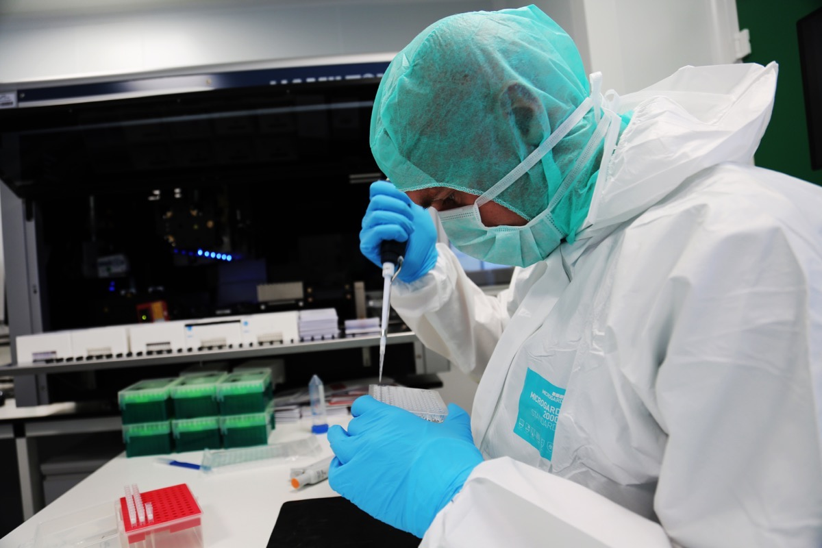 Prélèvement biologique